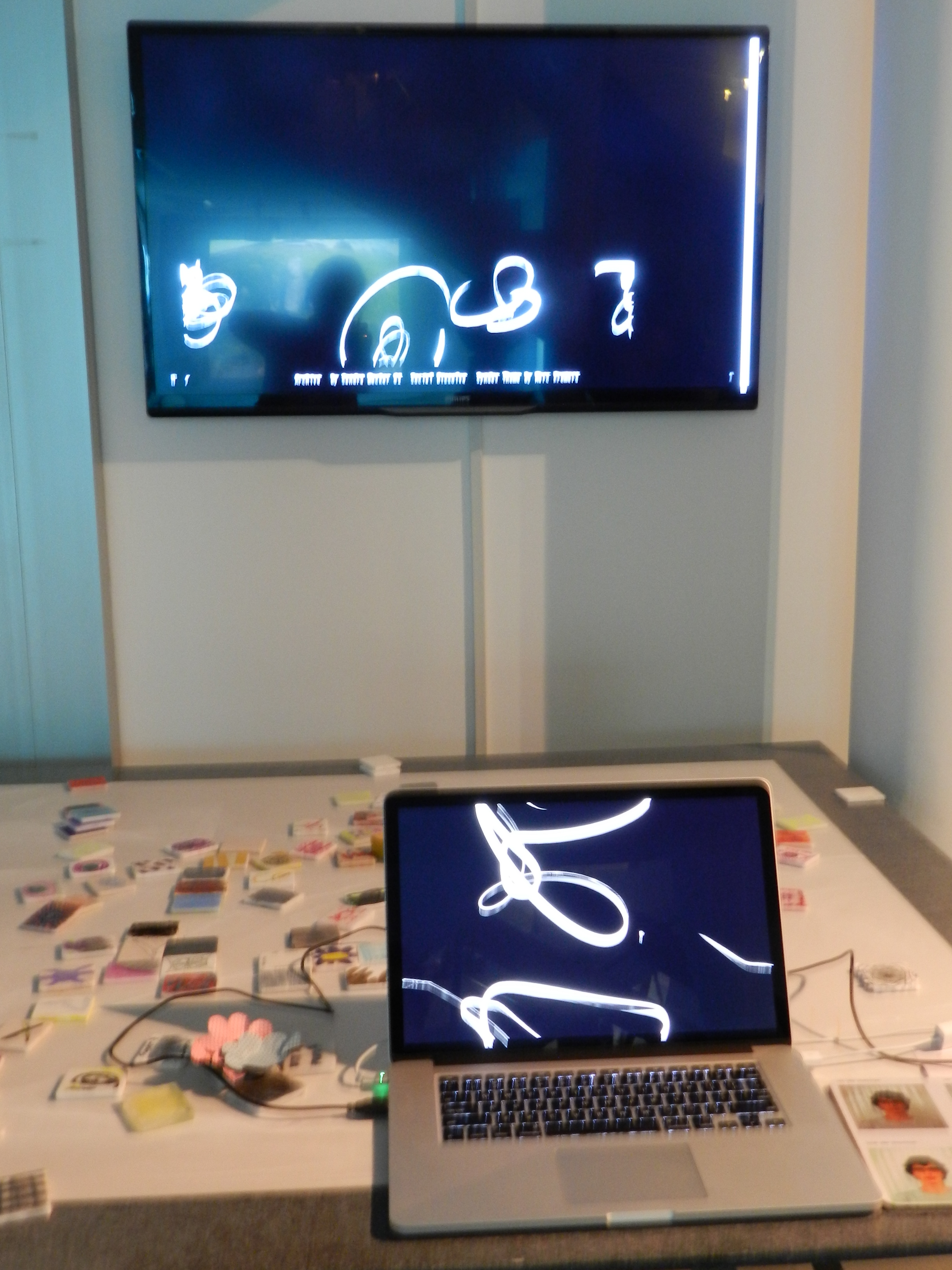 Ausstellung "Social Dissolve", Arbeit mit Processing, Goethe-Institut Porto Alegre, Brasilien 2014, Sandra Becker 01